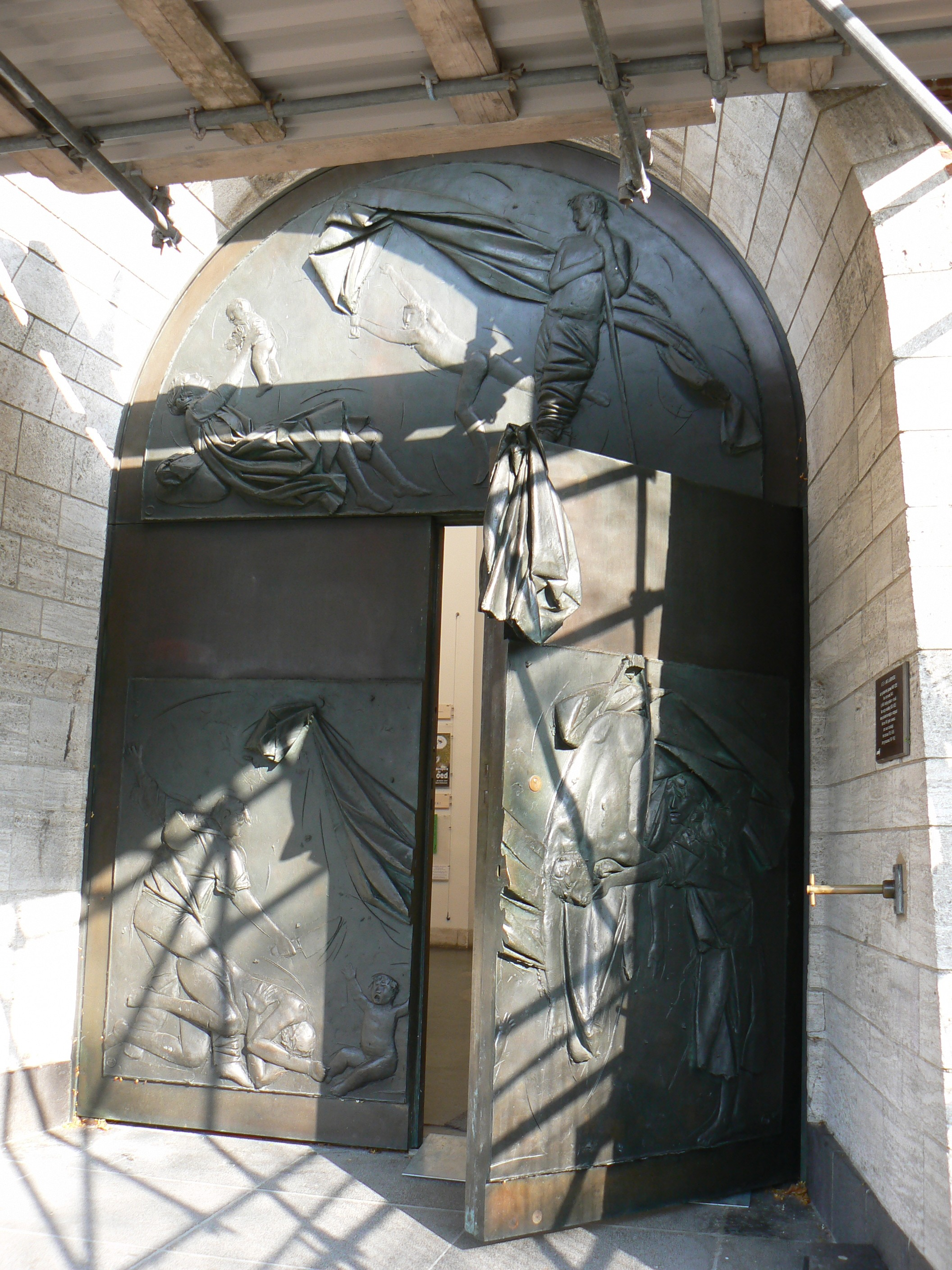 sculptured doors "Deuren van oorlog en vrede" (1968) Laurenskerk by Giacomo Manzu in Rotterdam/The Netherlands